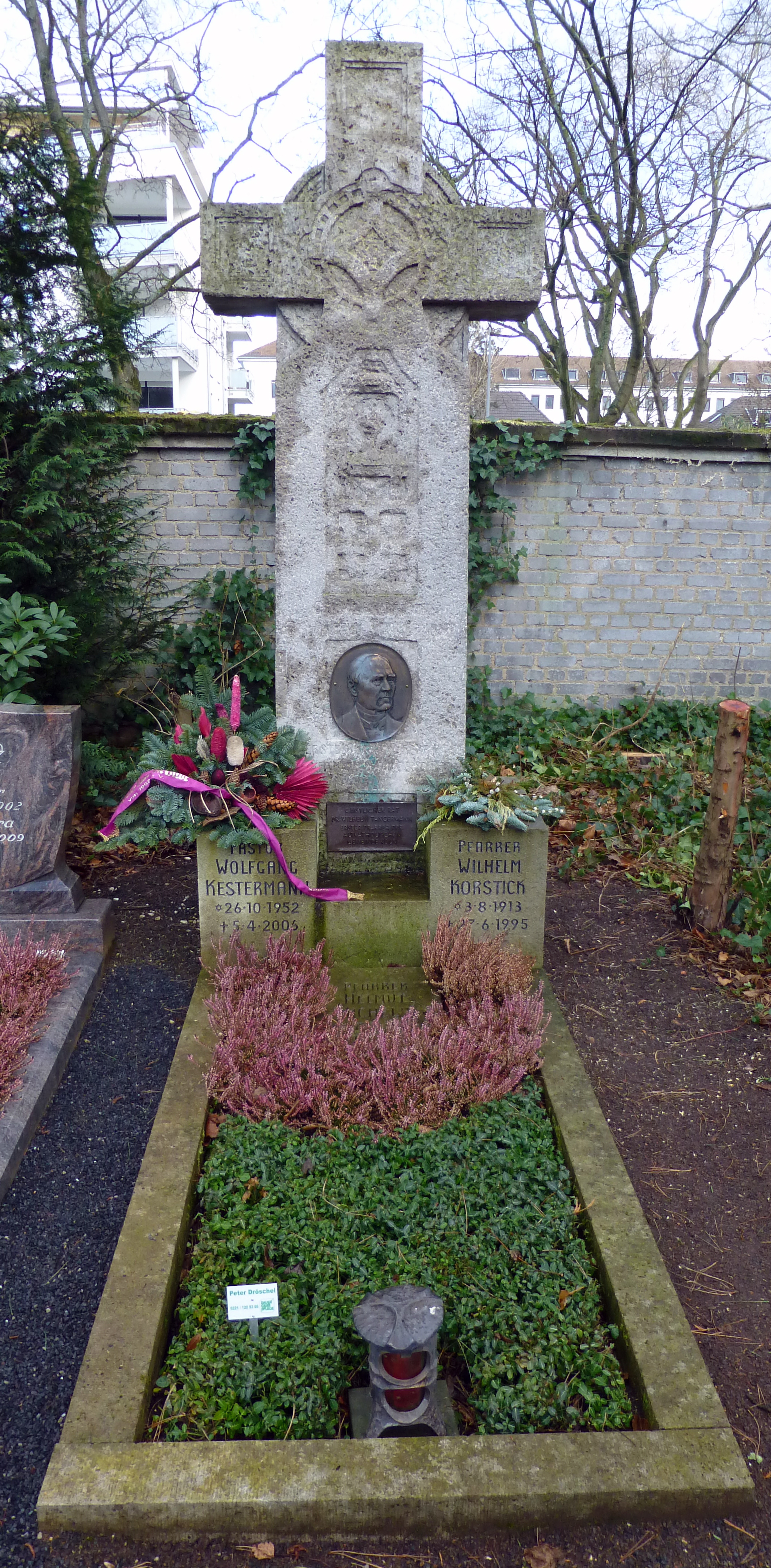 Grabstätte von Wilhelm Tangermann auf dem Kölner Melaten-Friedhof. Künstler/Bildhauer: Johann Baptist Schreiner 1910.